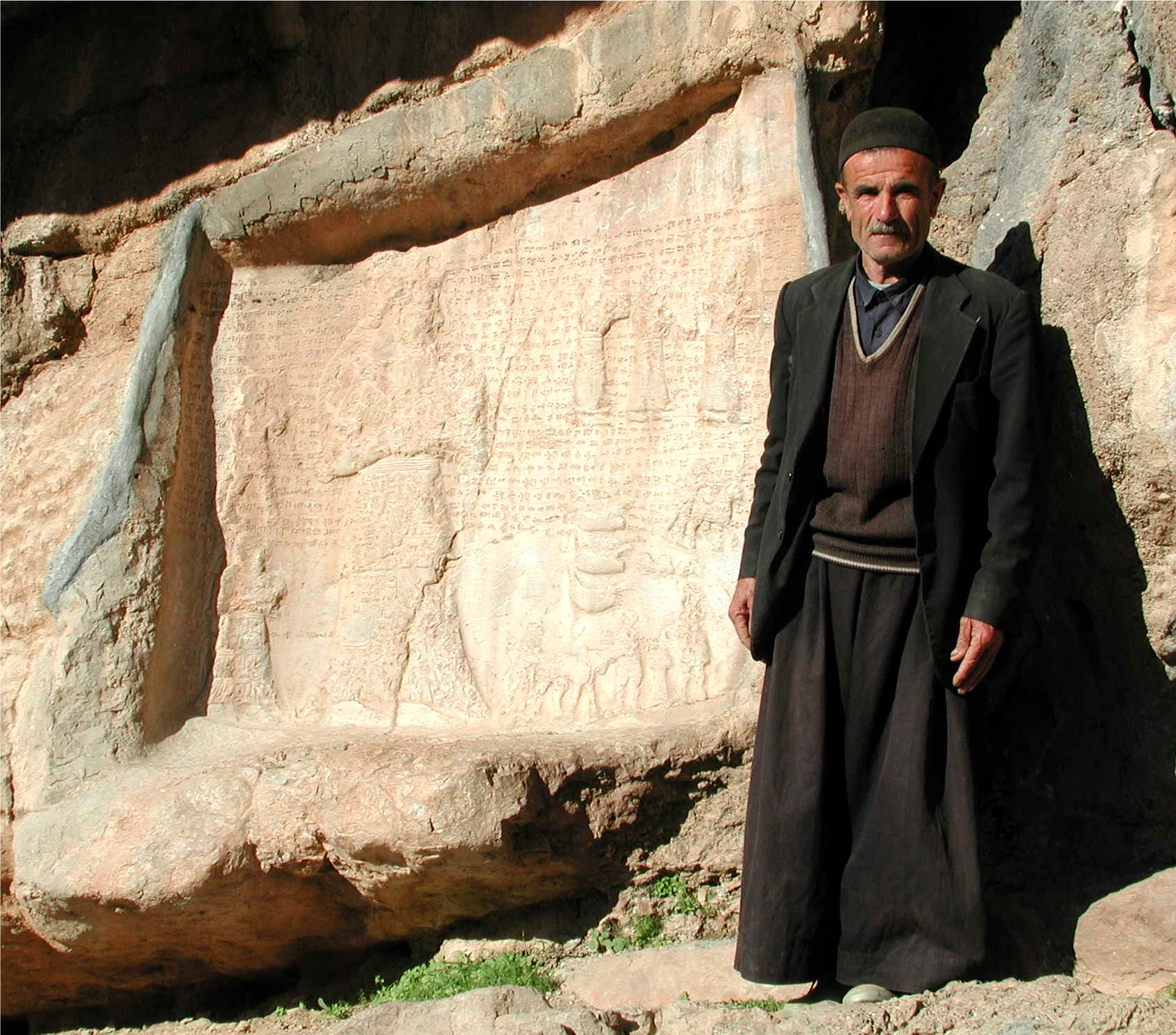 Relieve de Kul-e Farah I (650-575 a.C.)